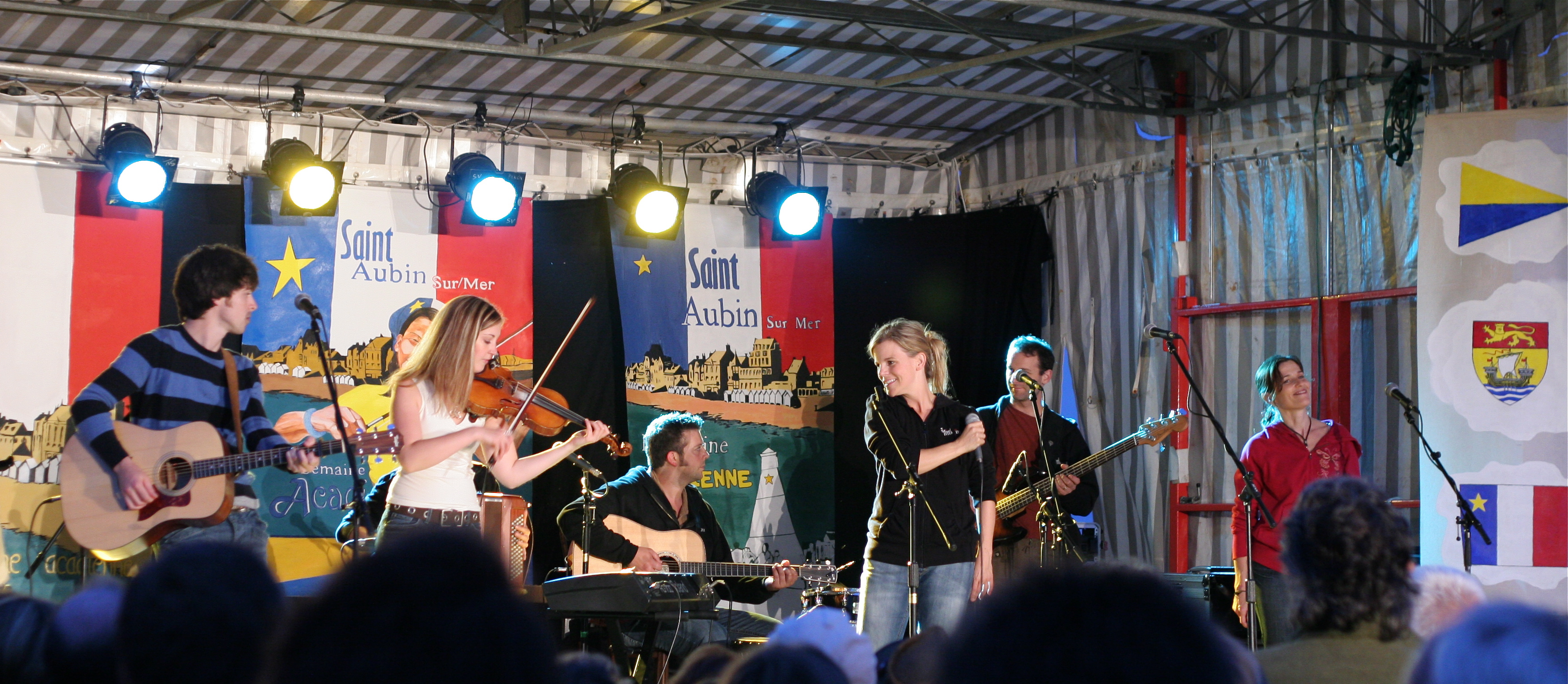 Vue d'ensemble du groupe 'Ode à l'Acadie' lors de sa performance à Saint Aubin sur Mer (Calvados, France), dans le cadre de la Semaine Acadienne.